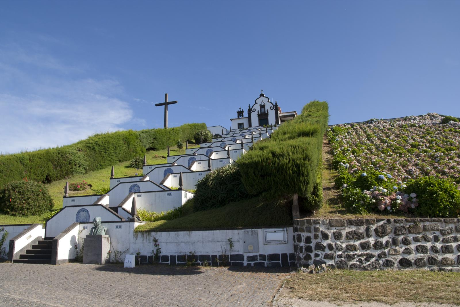 Sao Miguel